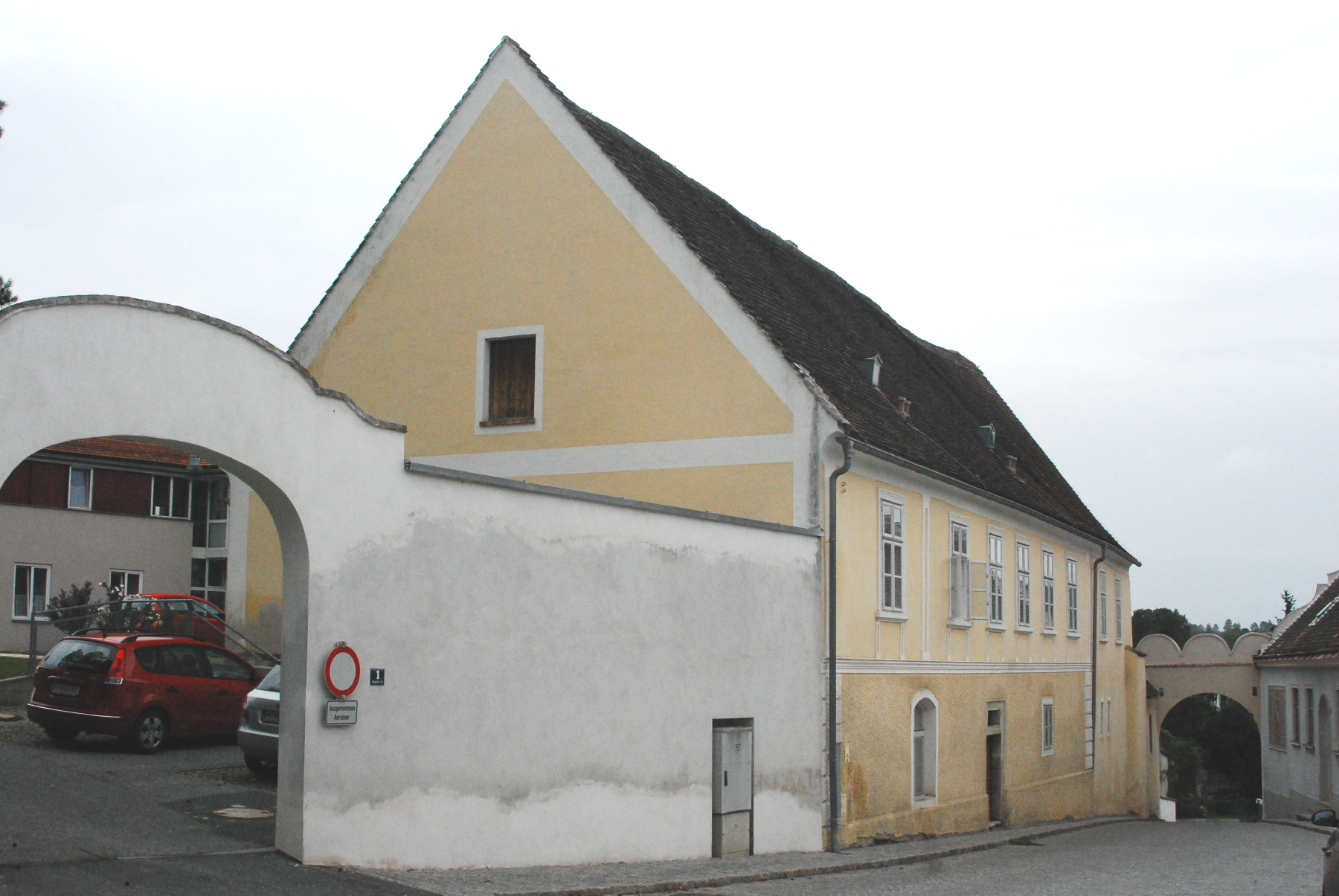 ehemaliges Brauhaus von Drosendorf Stadt in Niederösterreich. Rechts im Bild das Raabser Tor.